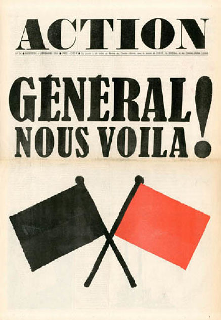 Action est un journal militant créé au début de mai1968 en France.